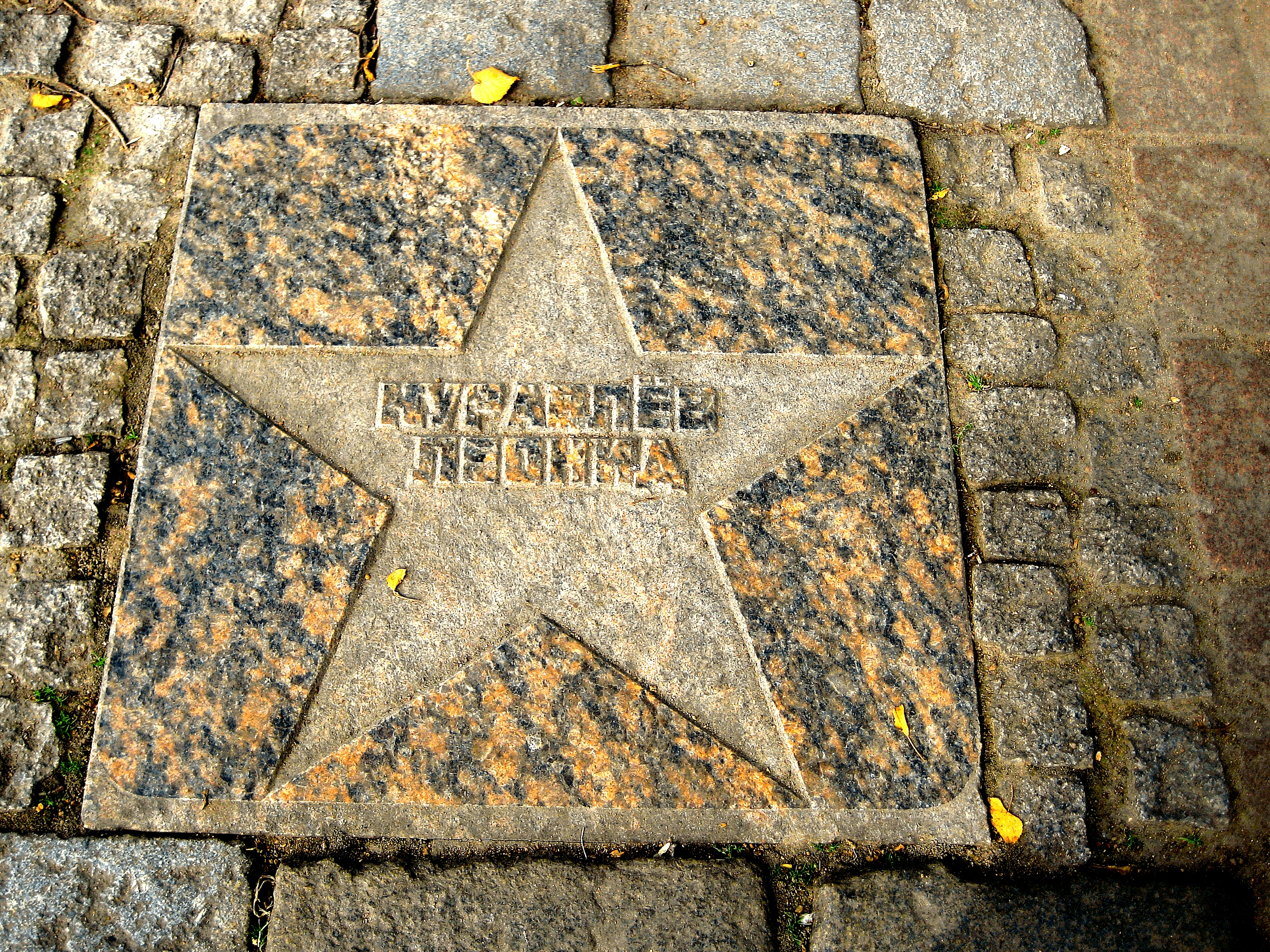 Выборг. Крепостная улица. Аллея актёрской славы.